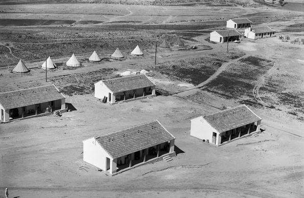 יד מרדכי - מראה.